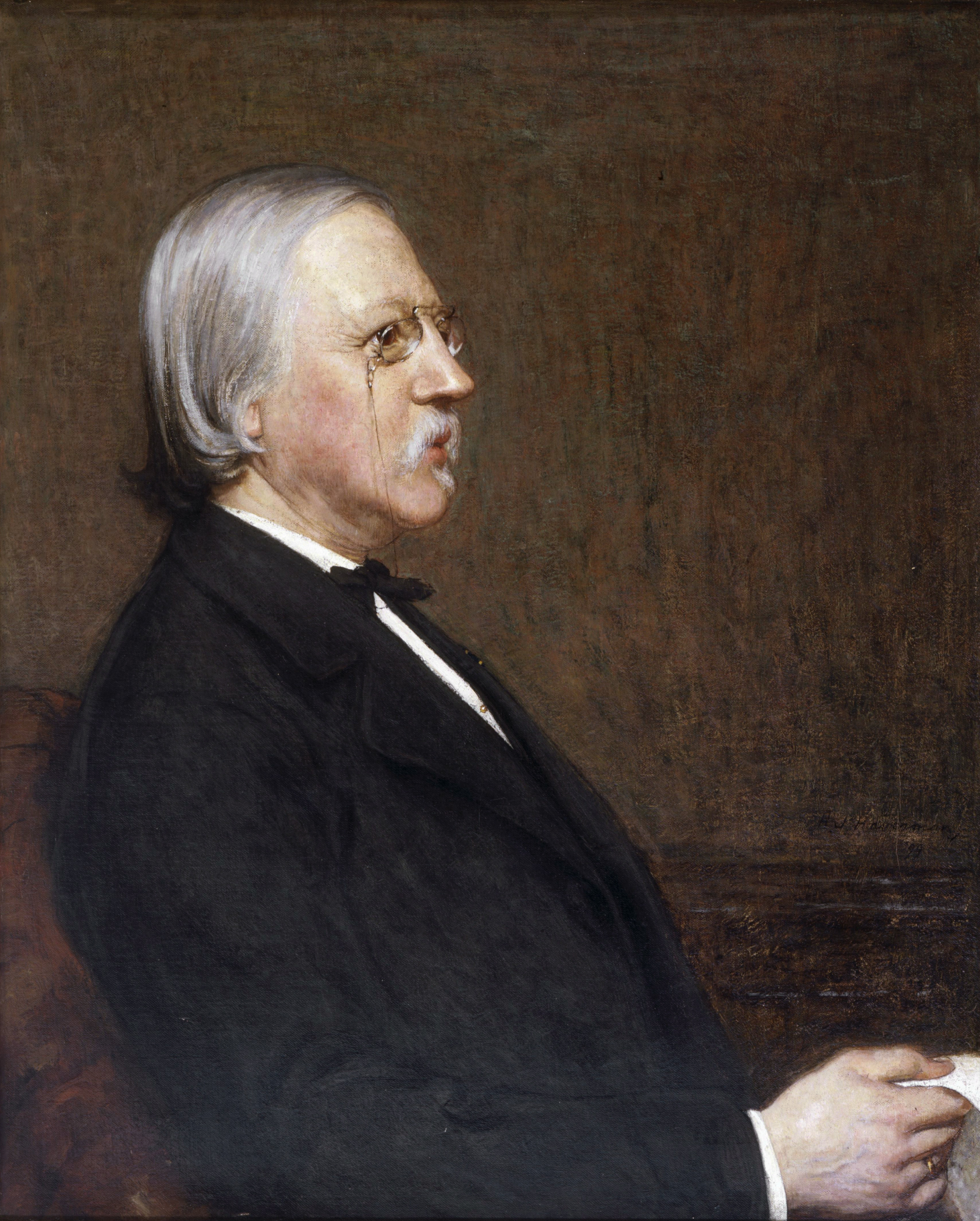 Hendrick Peter Godfried Quack (1834-1917)